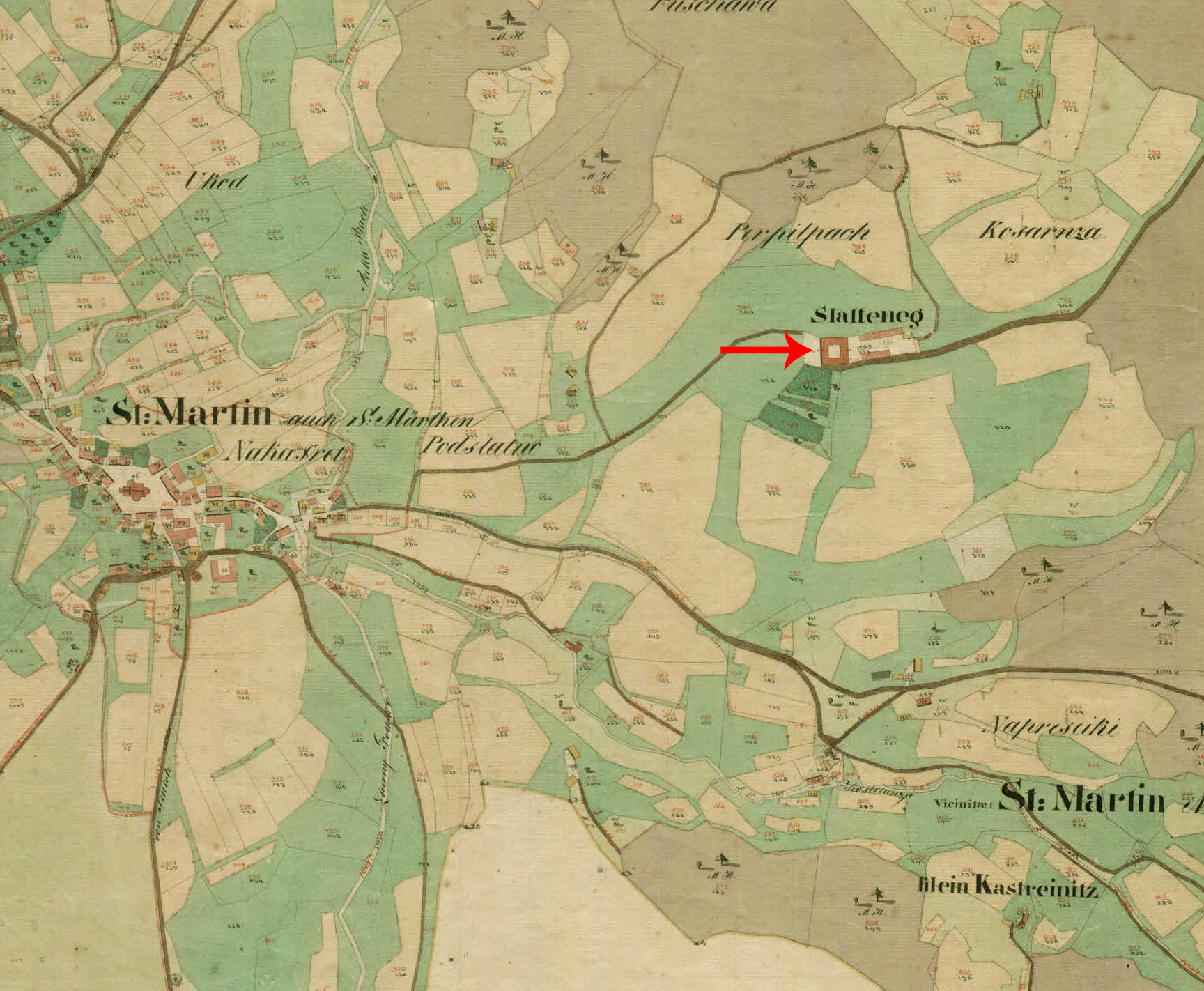 Franciscejski kataster za Kranjsko, 1823-1869